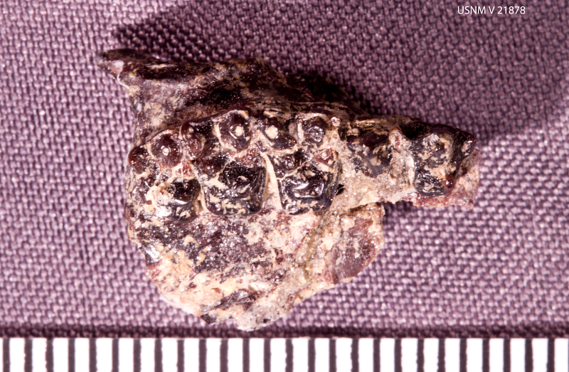 Hemiacodon gracilis Marsh